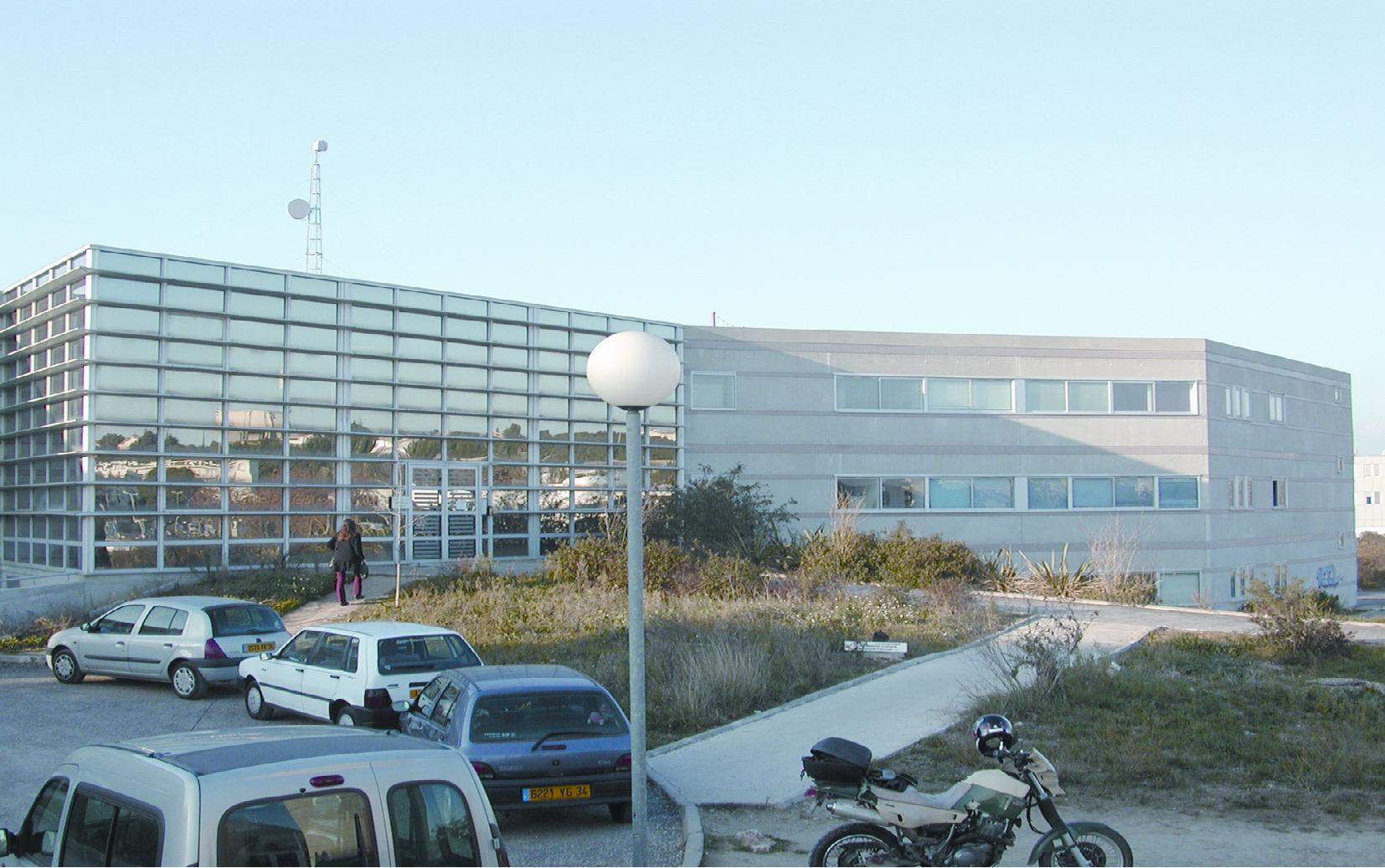 L'IURC (Institut Universitaire de Recherche Clinique) Photographie personnelle prise en mai 2005